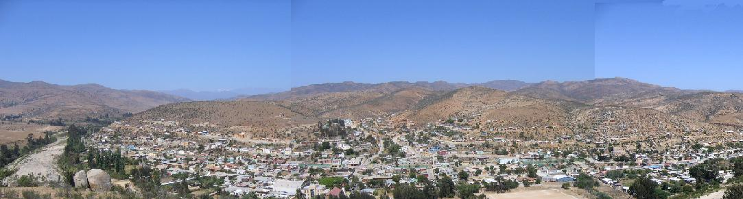 canela